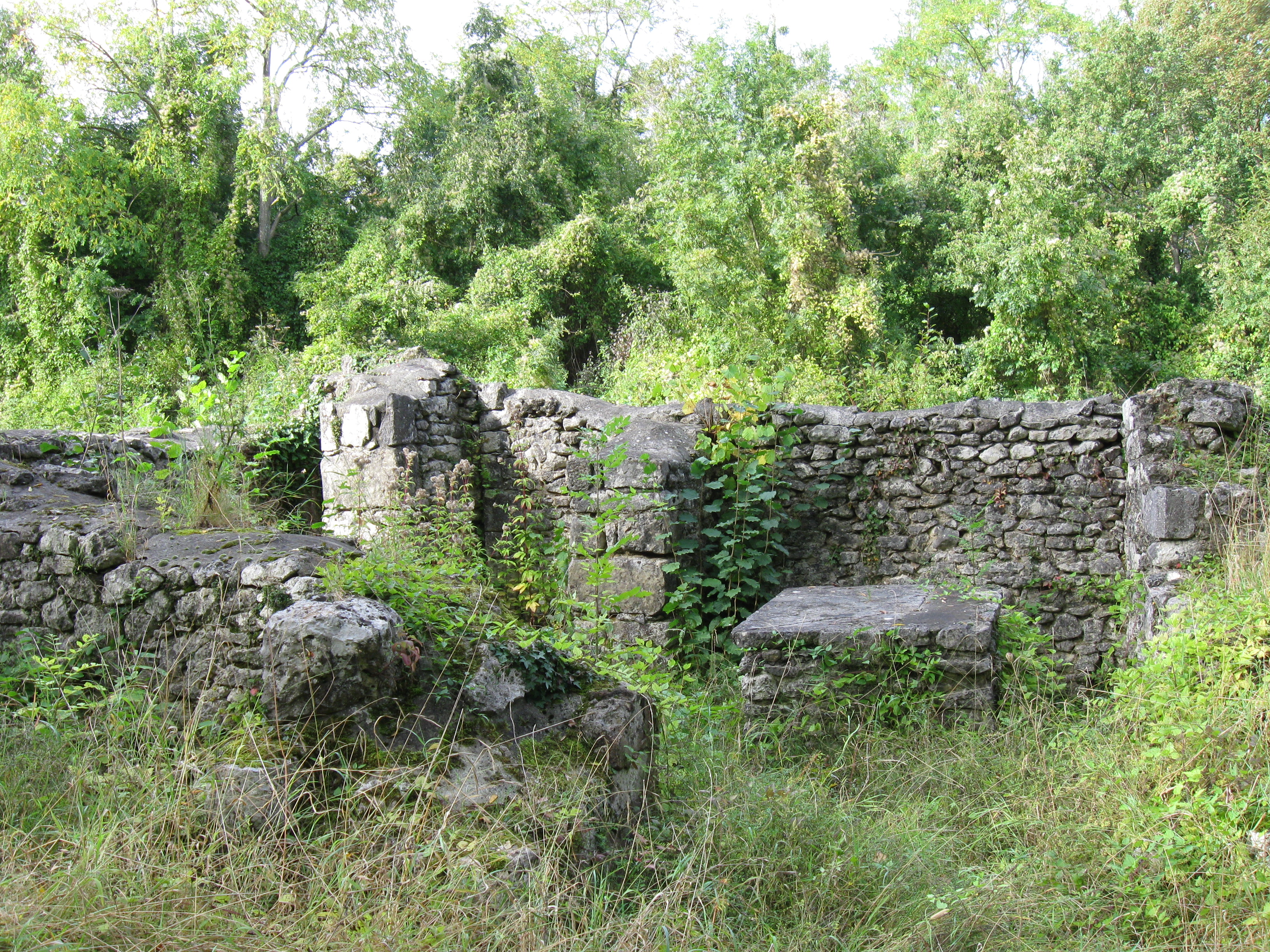 Vestiges de l’église Saint-Michel de Poigny. (département de la Seine et Marne, région Île-de-France).